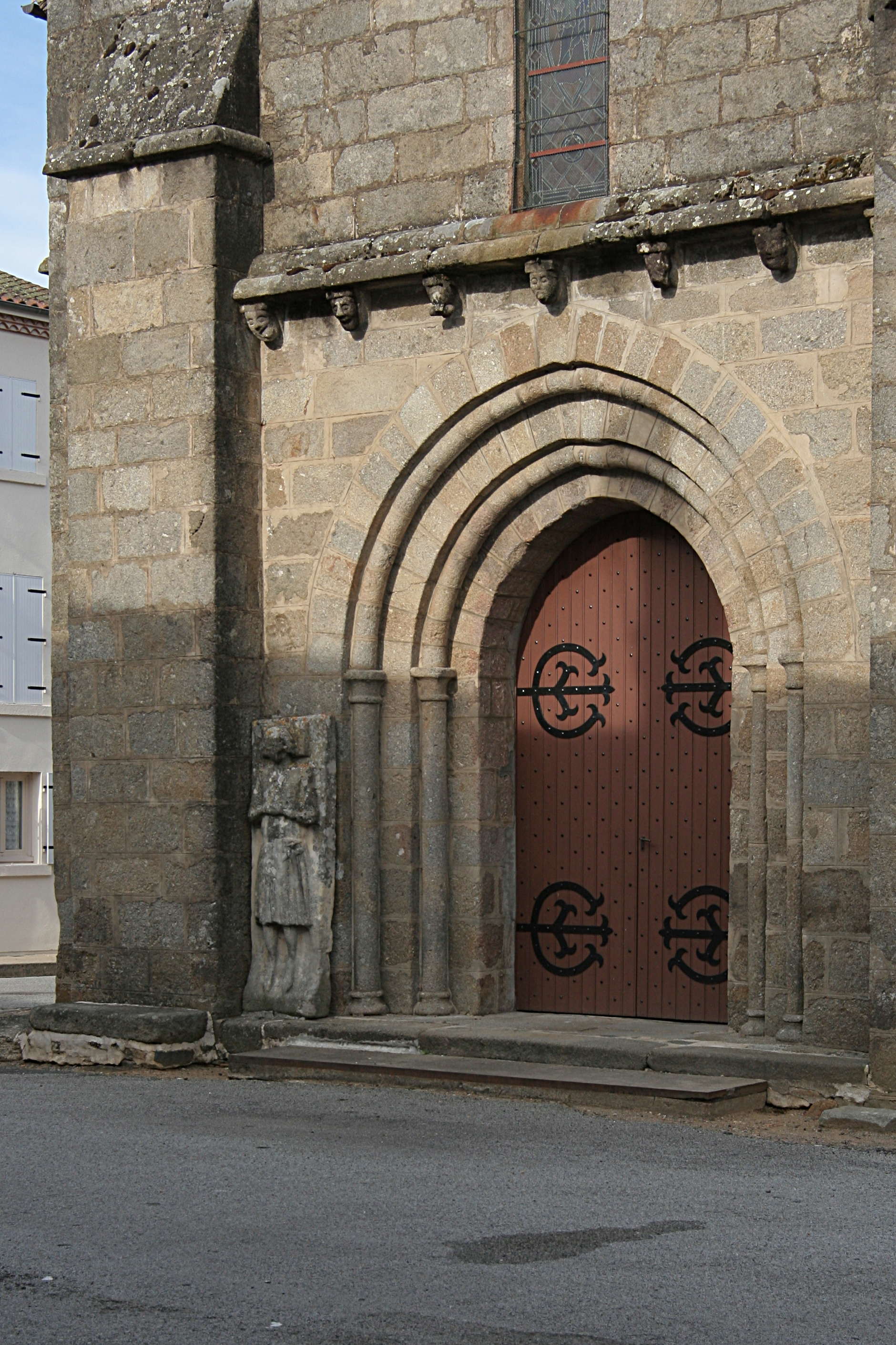 Église Saint-Maurice de Bussière-Poitevine : entrée et gisant du XVe siècle.